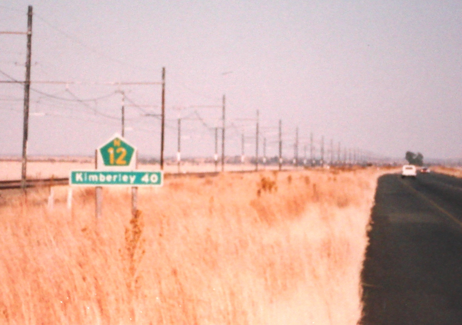 Bild des Straßenschildes einer Nationalstraße in RSA